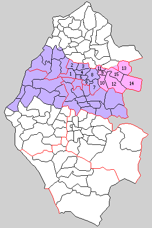 福井県吉田郡の町村制時点の町村。